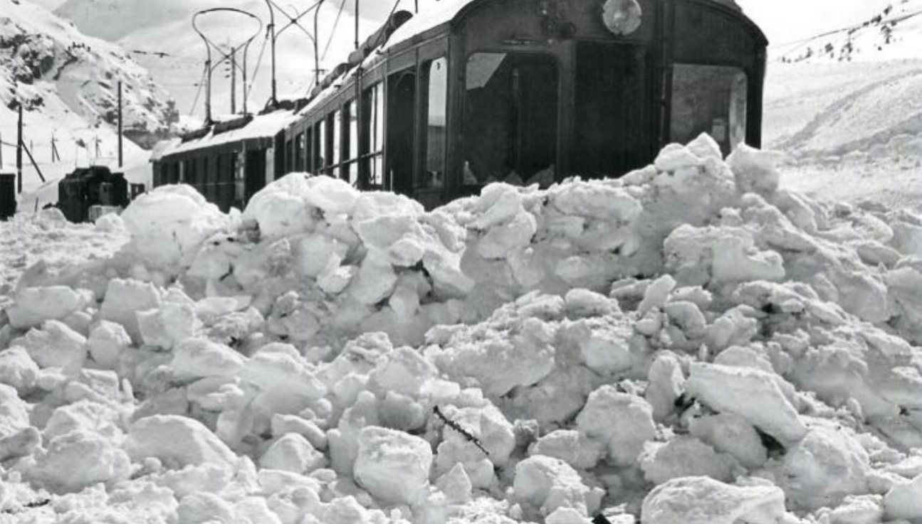 Am 22. März 1934 erfasste in Bernina Suot eine Grundlawine einen Dienstzug auf einer Räumfahrt auf der wegen Sturmwinden geschlossenen Berninabahn. Die Grundlawine hat den Führerstand des BCe 4/4 10 eingedrückt.